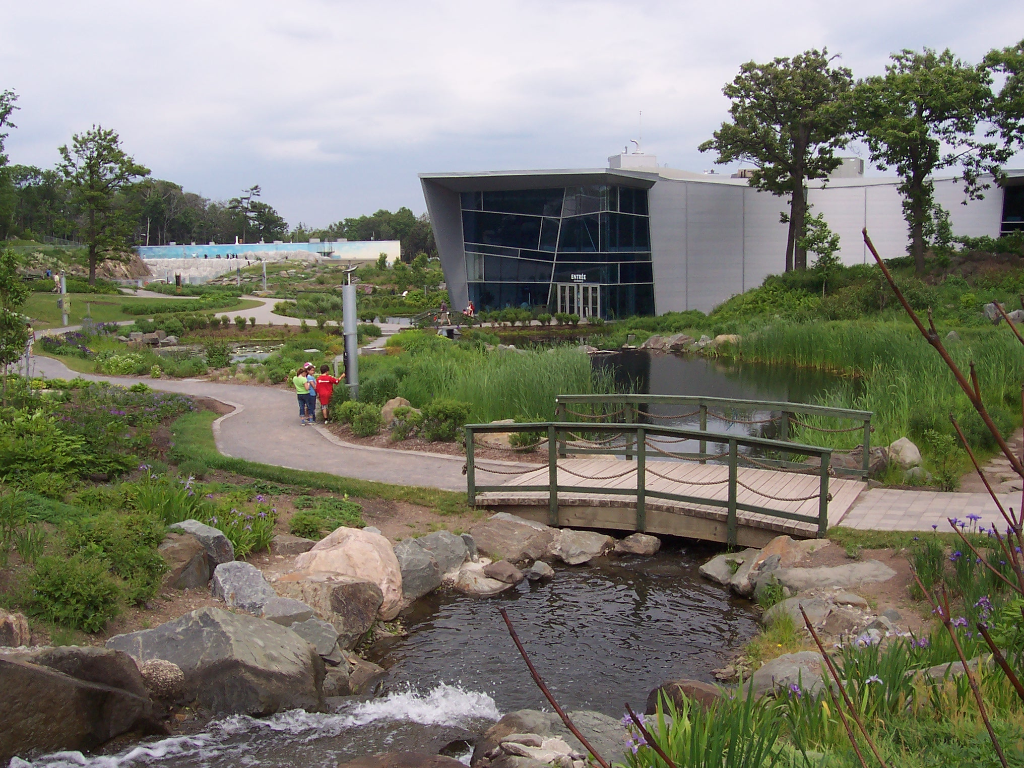 Parc aquarium du Québec: Le bâtiment principal, la cascade et les jardins; Main building, stream and gardens at the Parc Aquarium du Québec (Quebec city, Quebec, Canada)